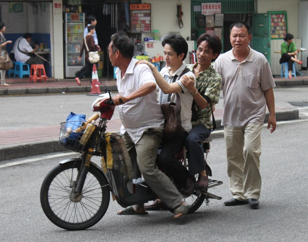 E-Bike als Schwarztaxi unterwegs. Ein Fahrer/Besitzer und zwei Fahrgäste. Der Vierte gibt Anschubs.